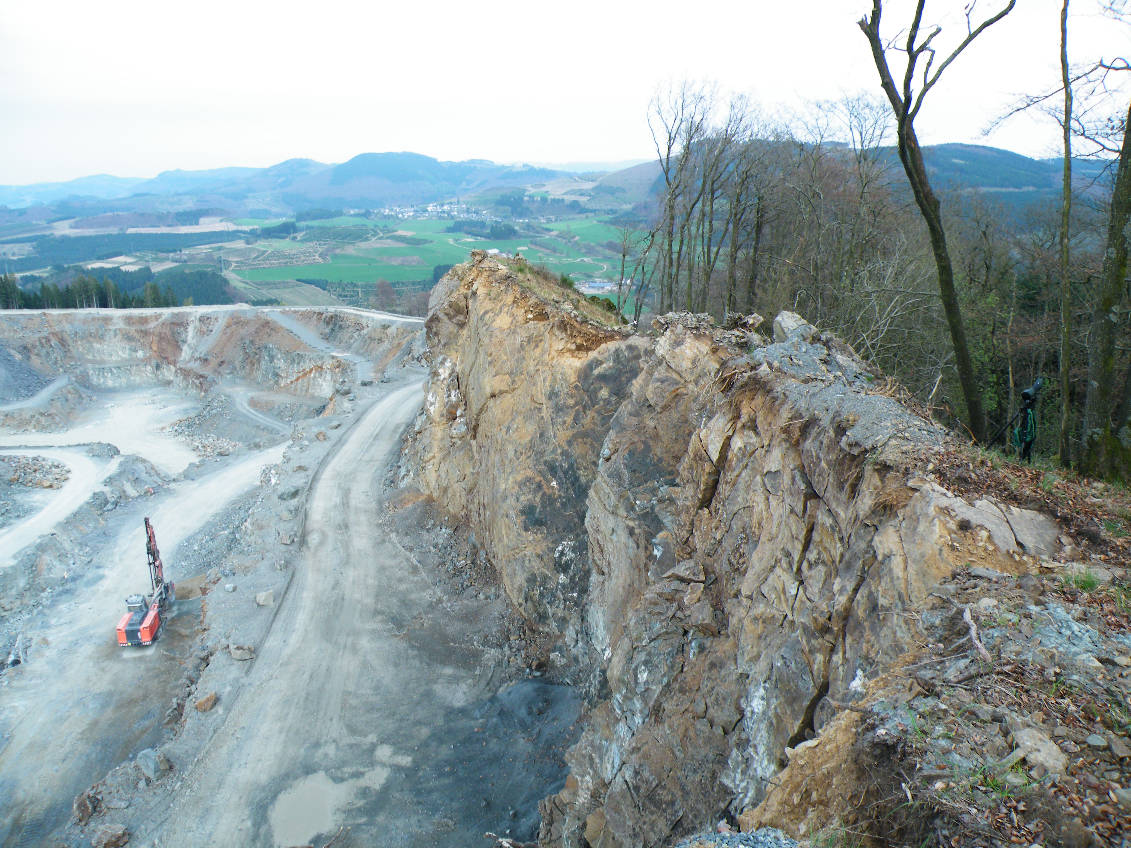 Nordostrand des Naturschutzgebiet Auf der Burg (rechts im Bild) nördlich Bestwig-Berlar im Sauerland in NRW mit dem nördlich angrenzenden Steinbruch.